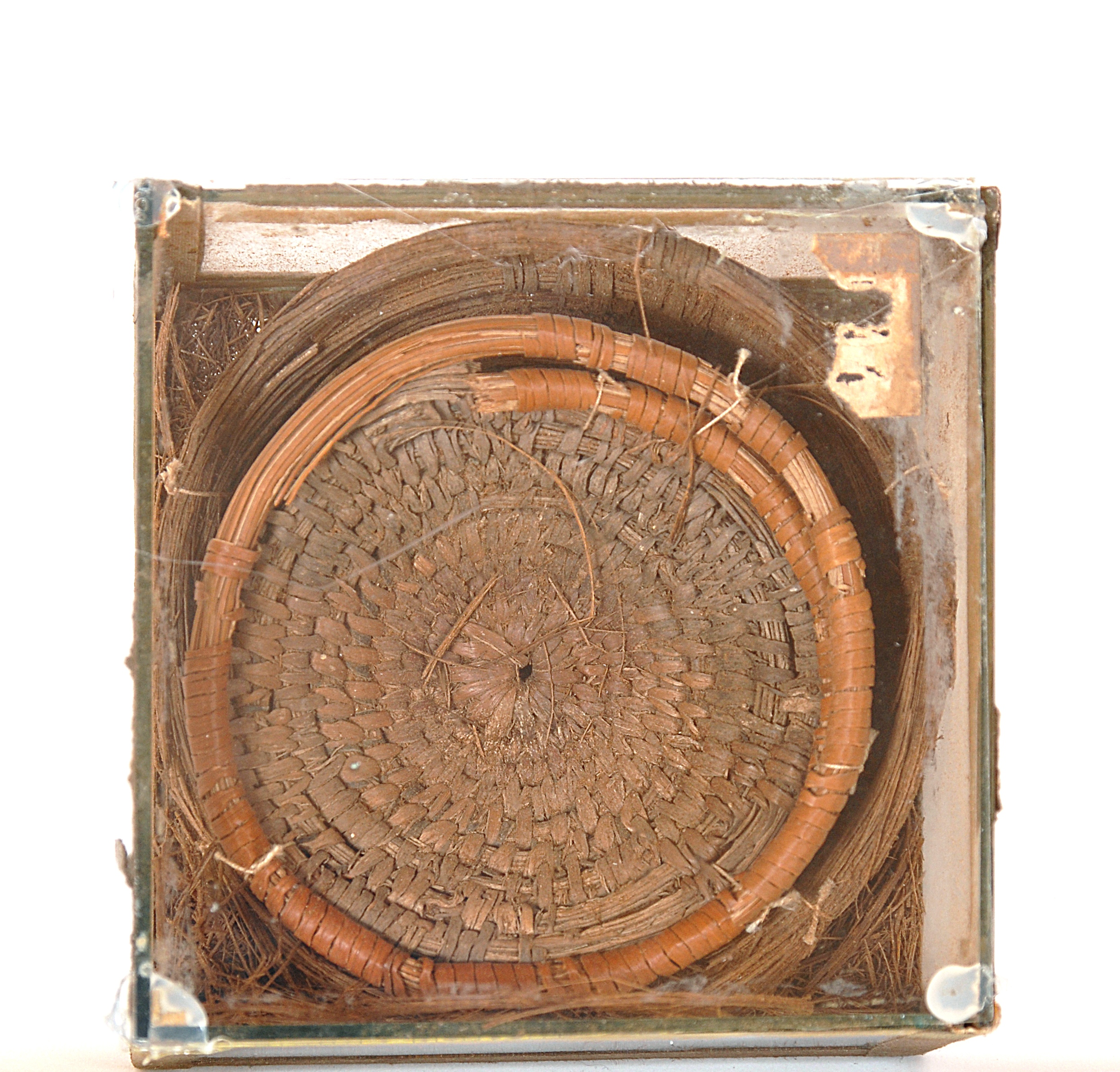 Dos cestos egípcios, de paja religada de forma cónica, trabajados de manera ascendente y helicoidal. Datación: 304-30 a.C